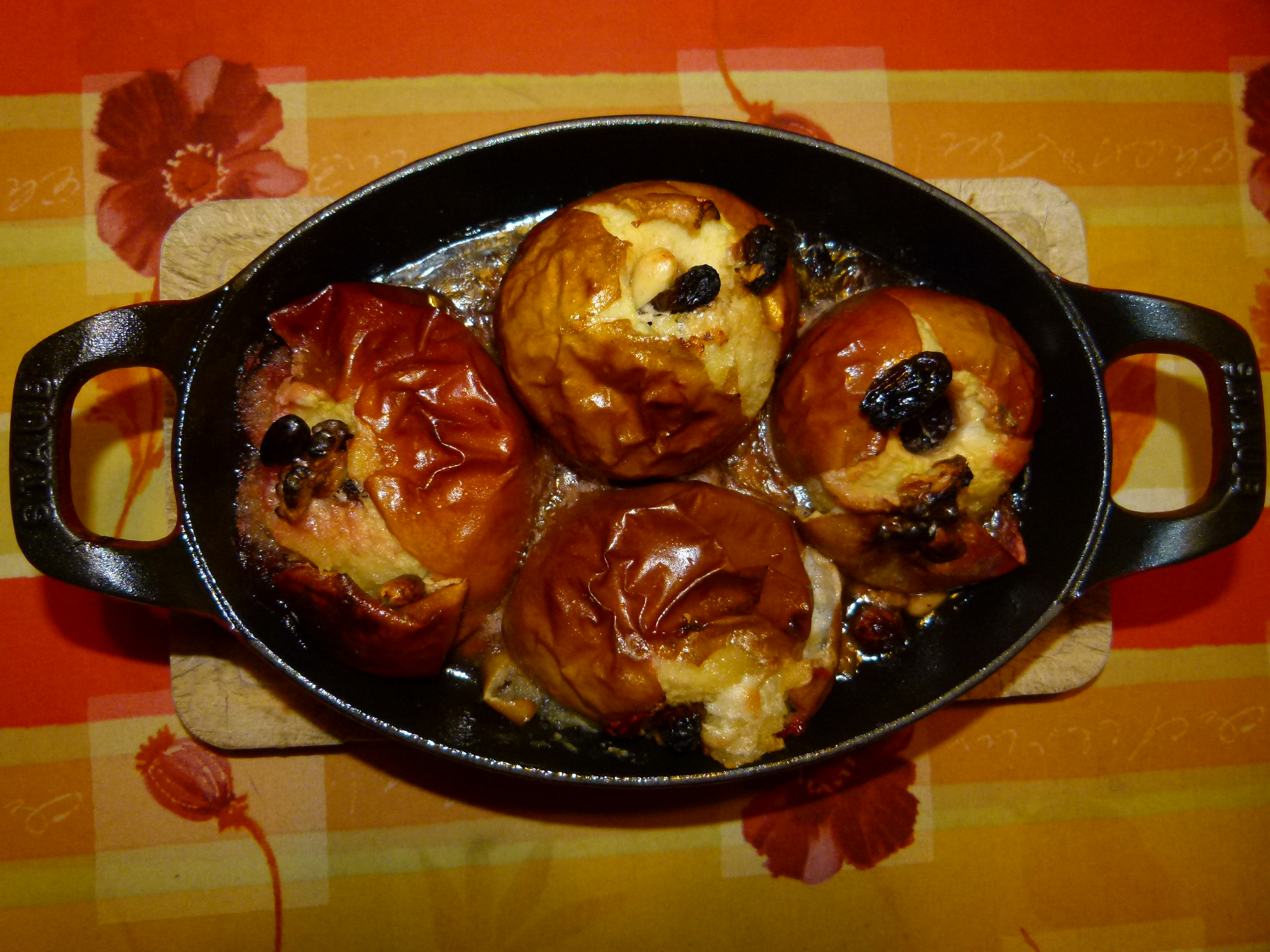 Bratäpfel